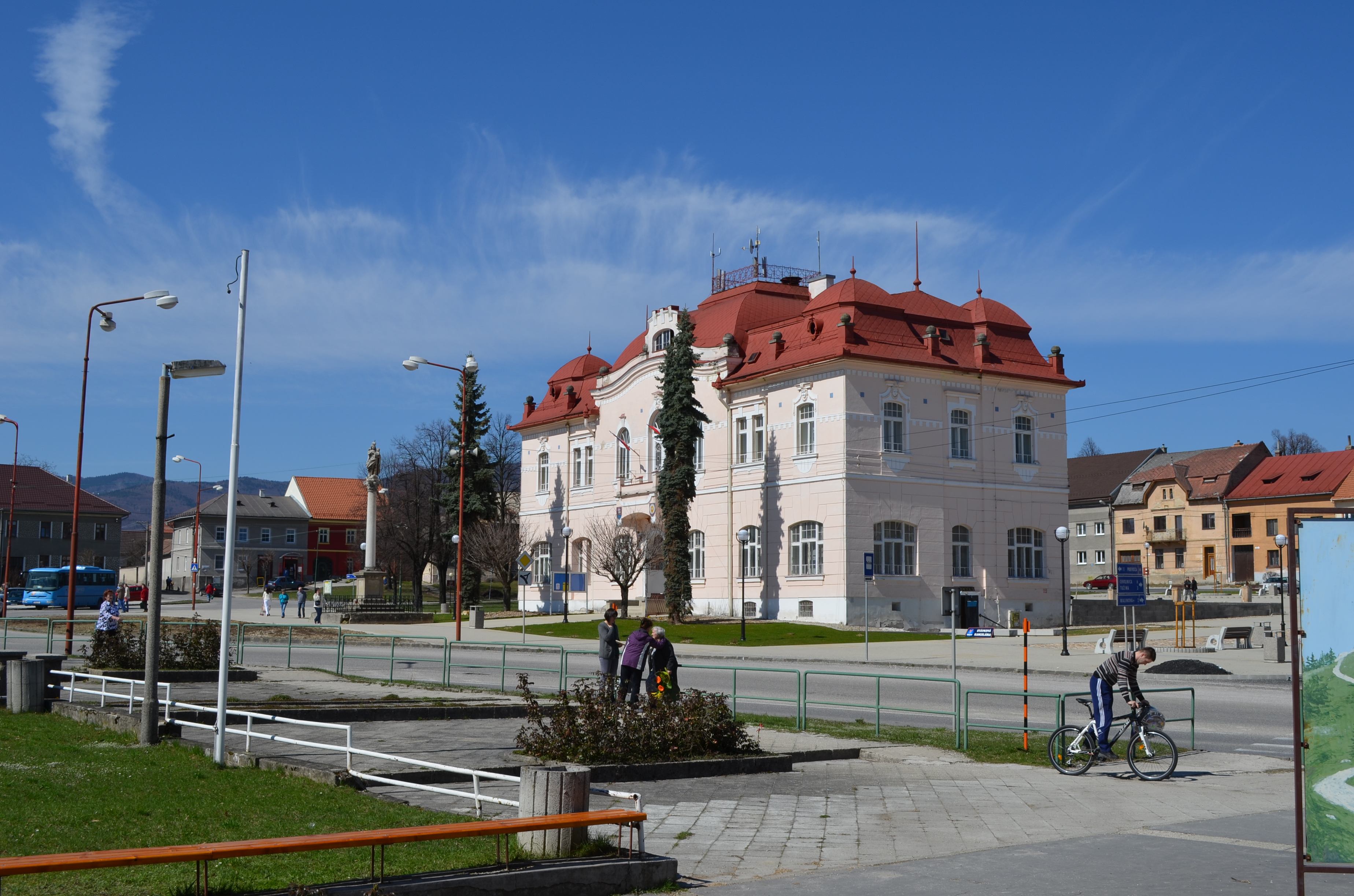 Németpróna